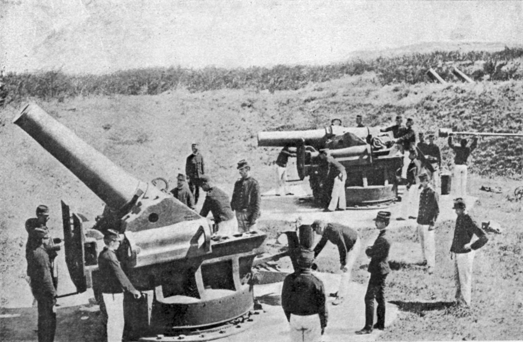 Batería de la Tente.—Morteros de 270 mm.